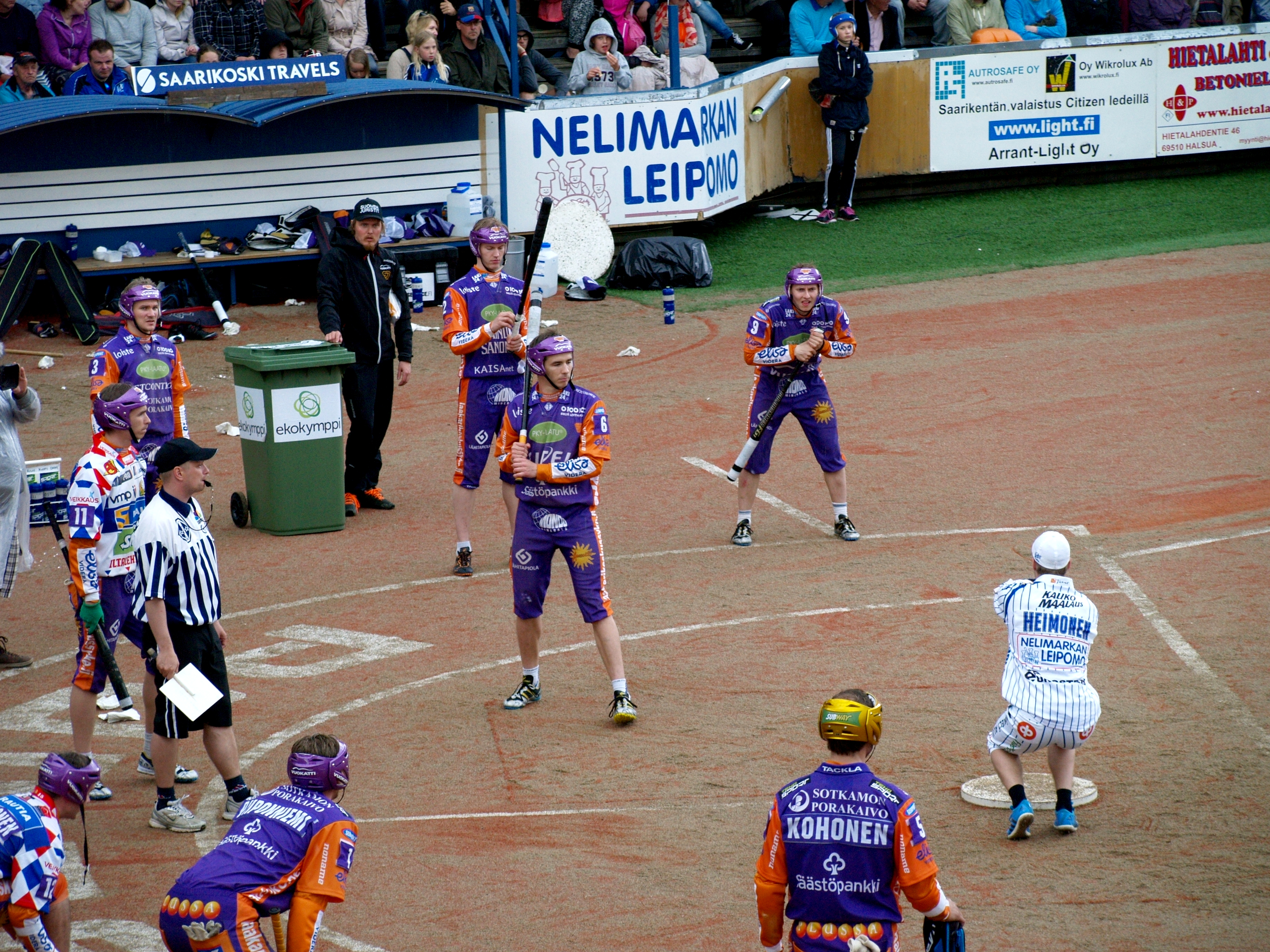 Vimpelin Veto - Sotkamon Jymy pesäpallo-ottelu 19.7.2015. Kuvassa lyömässä Immo Rautiainen.